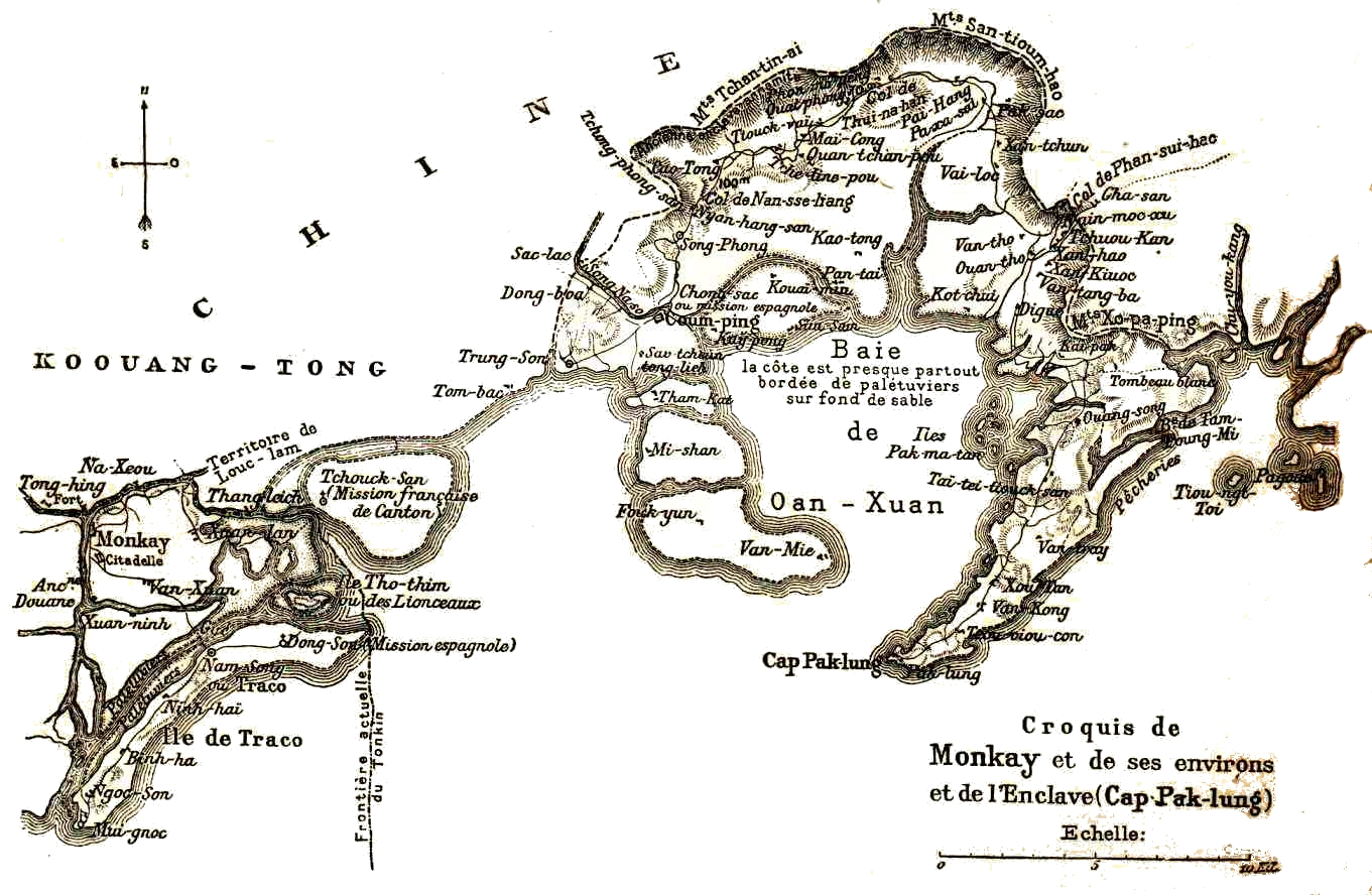 Khu vực cửa sông Bắc Luân, bán đảo Bạch Long và các làng người Kinh tại Vạn Mĩ nay thuộc Trung Quốc